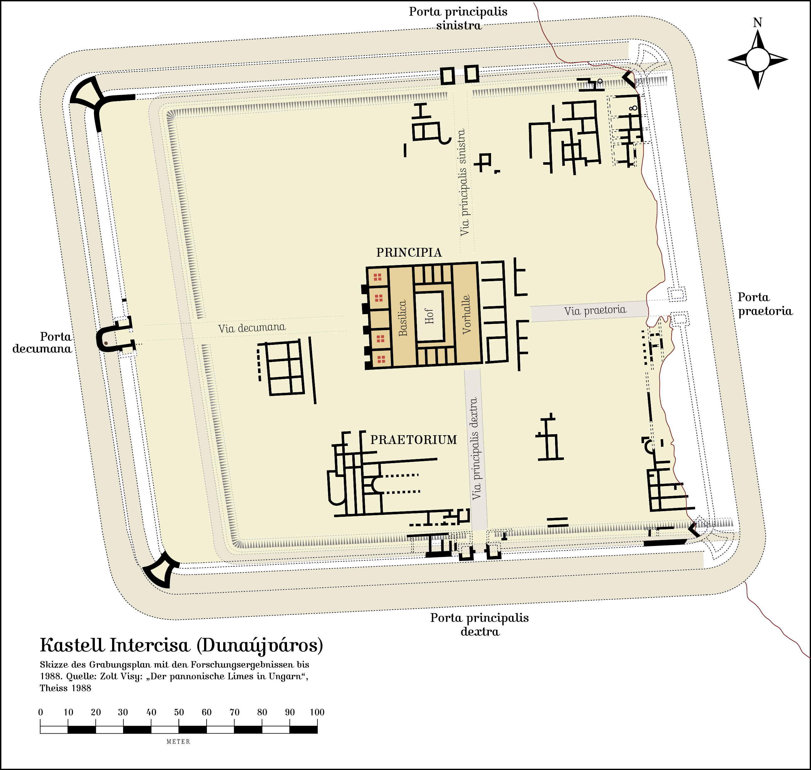 Kastell Intercisa (Dunaújváros): Skizze des Grabungsplan mit den Forschungsergebnissen bis 1988.